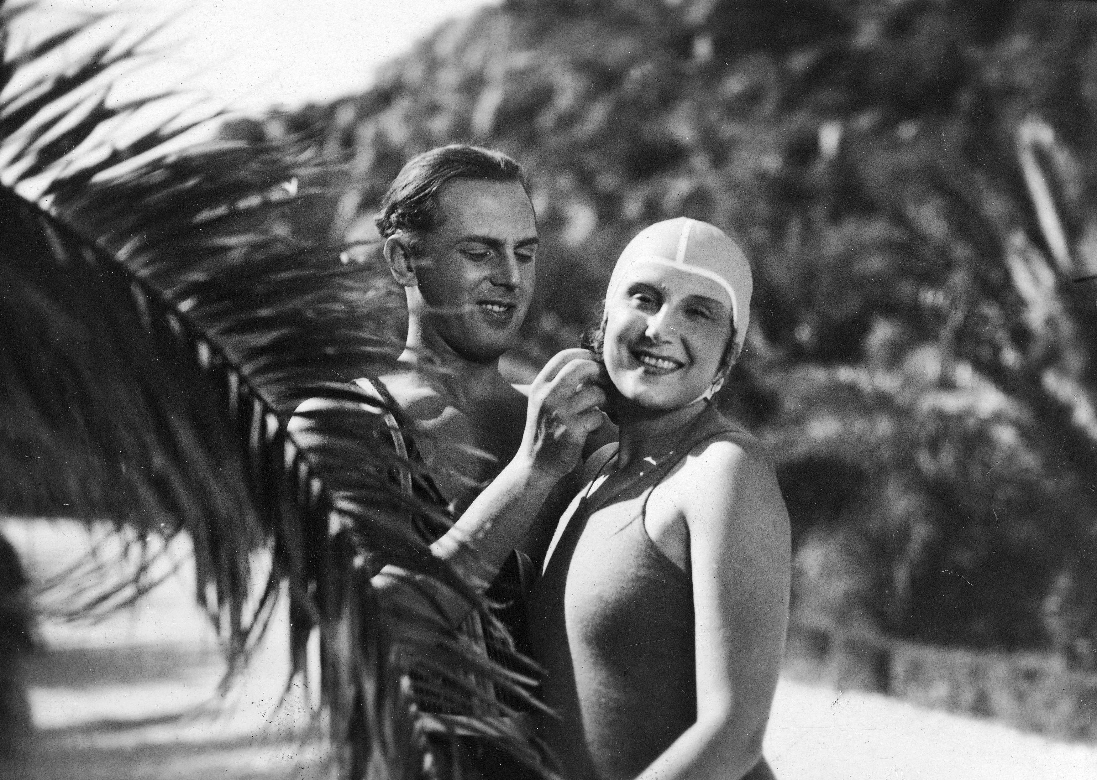 Alma Kar jako Marysia Kochańska i Aleksander Żabczyński jako prezes Adam Olszewicz w kostiumach kąpielowych w jednej ze scen filmu Panienka z poste-restante